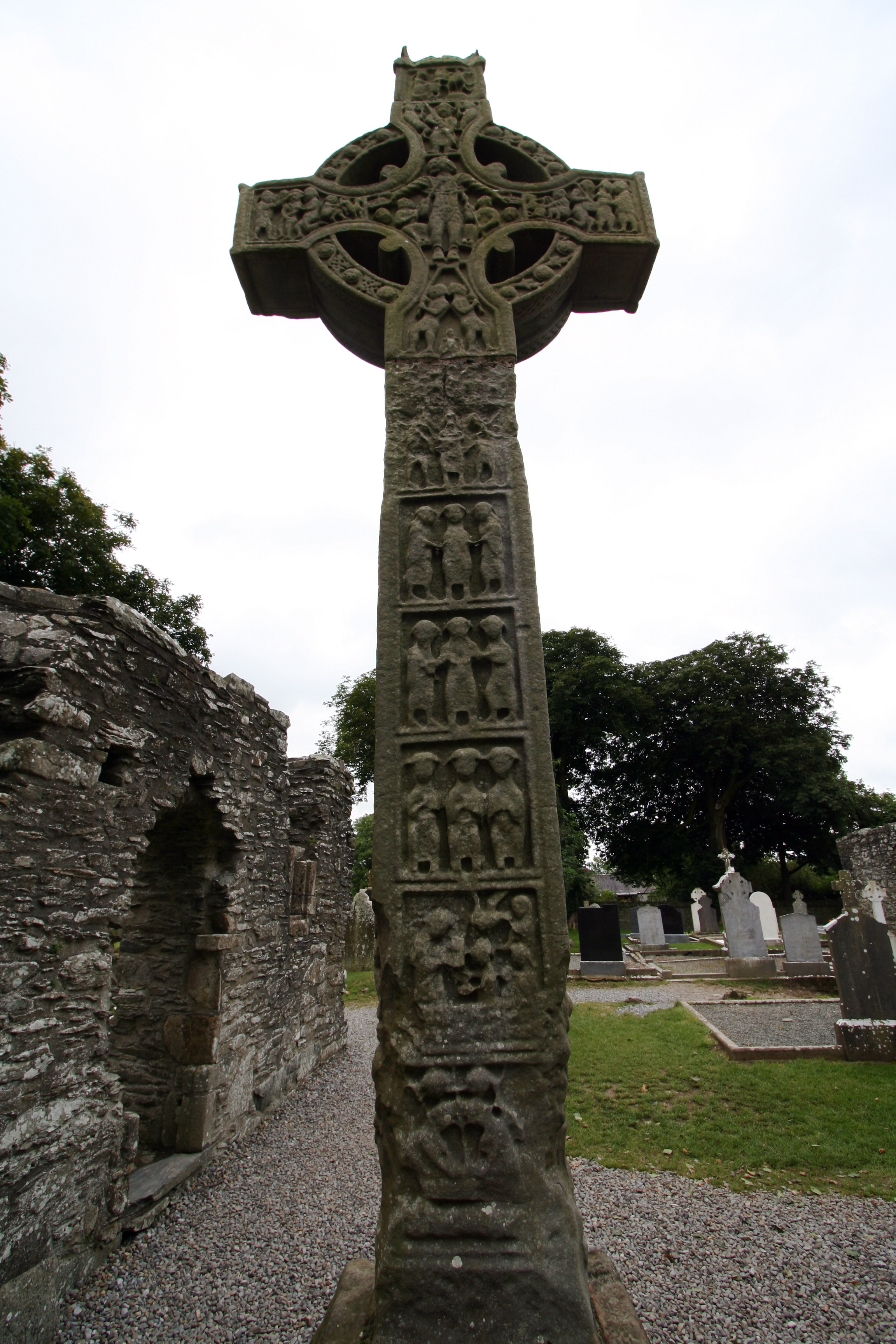 Monasterboice, West crossMonasterboice 12